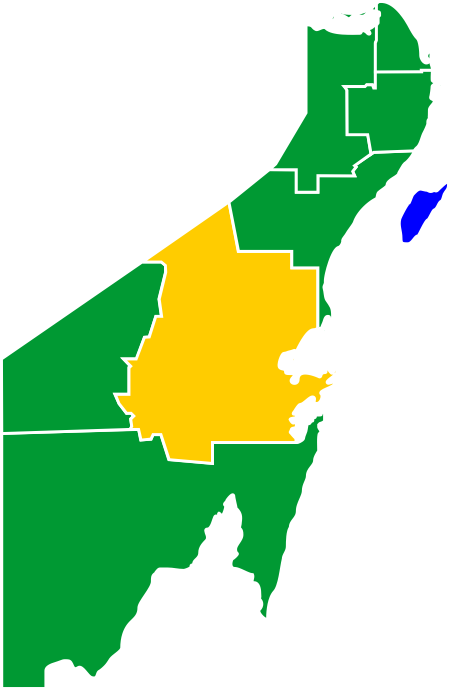 Resultados de la elección a Ayuntamientos por partido político en el estado de Quintana Roo, México en 2005.